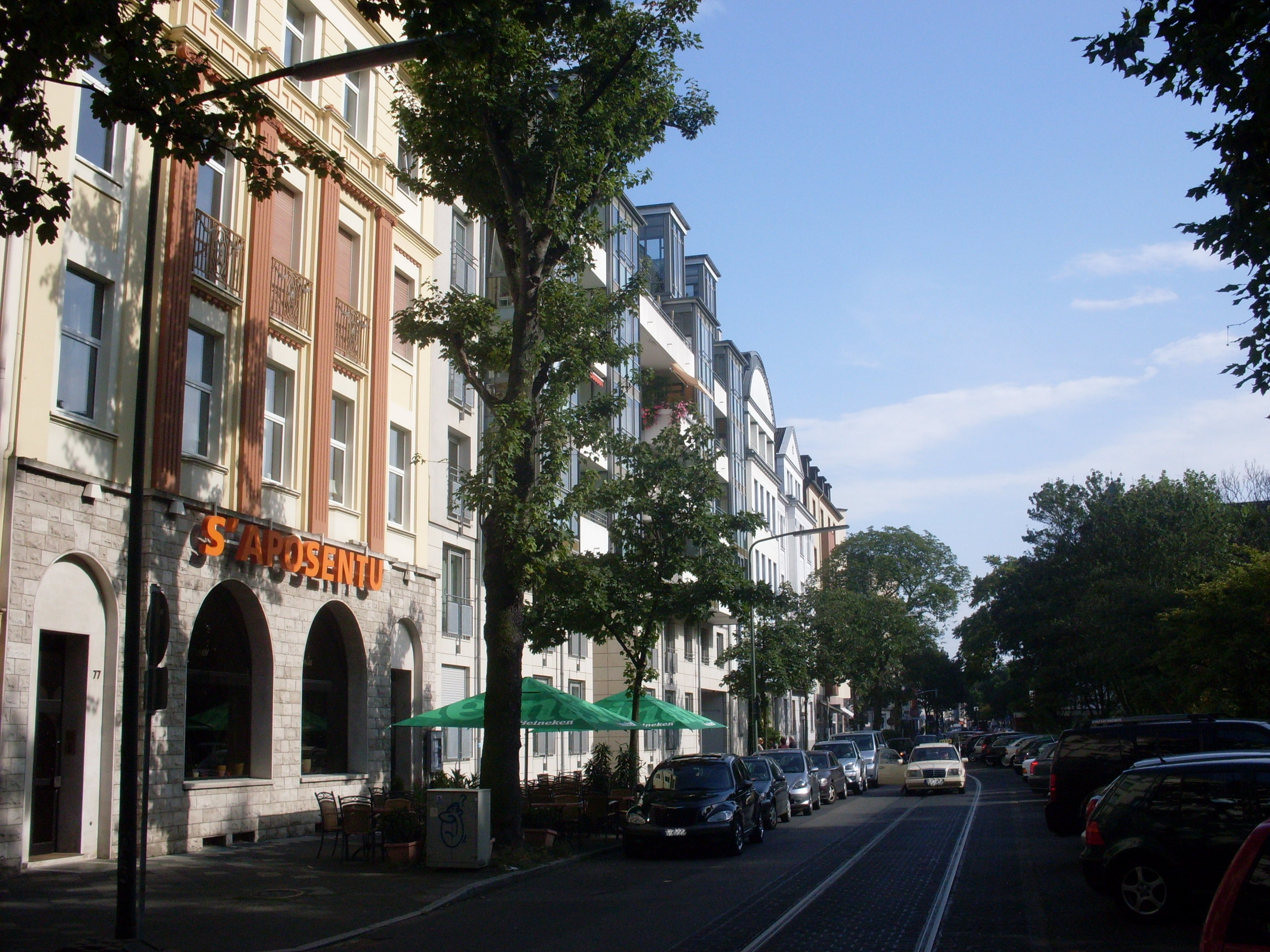 Düsseldorf-Pempelfort, Kaiserswerther Straße, mittlerer Teil